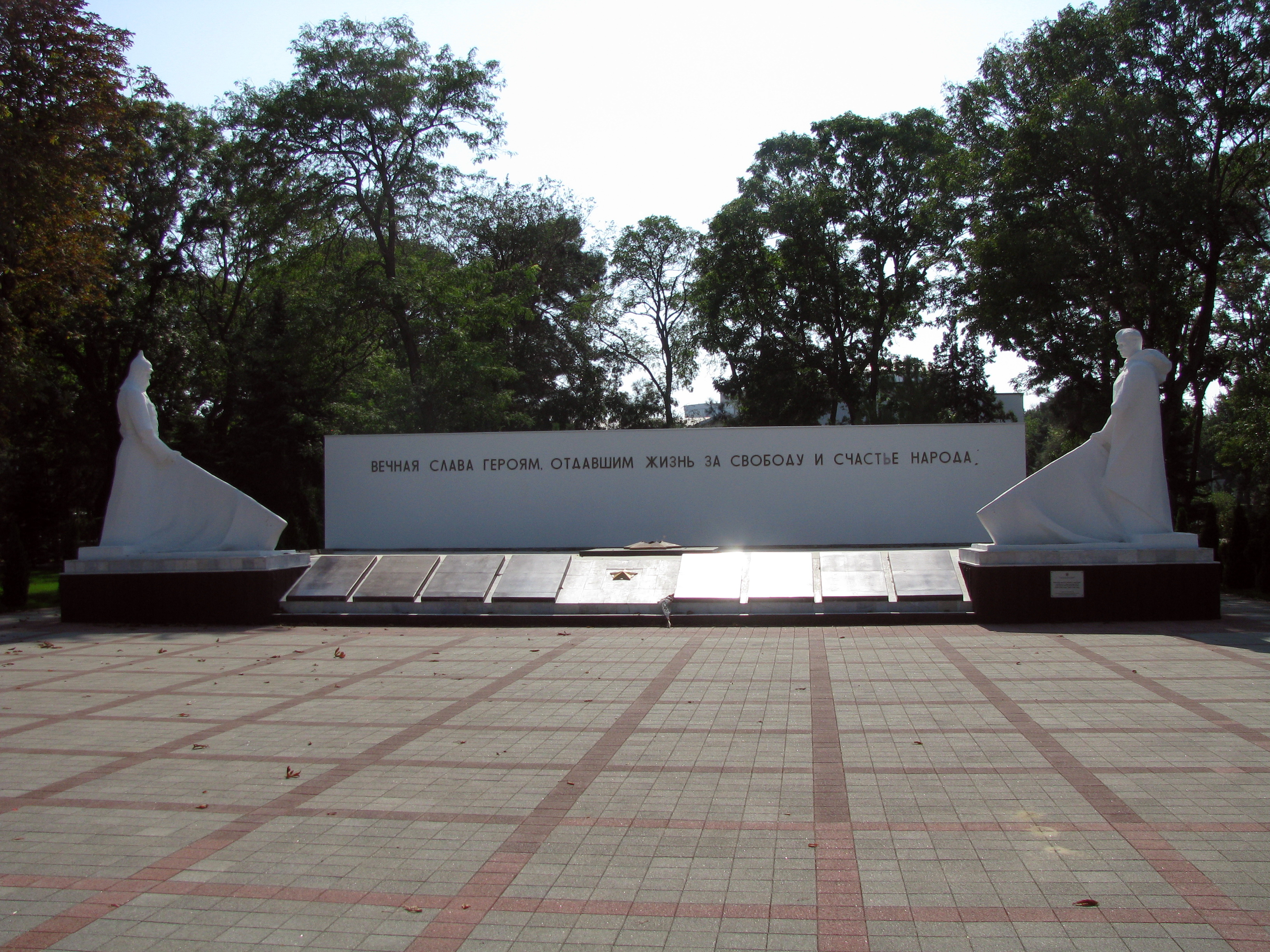 Вечный огонь, Сквер Славы, Анапа